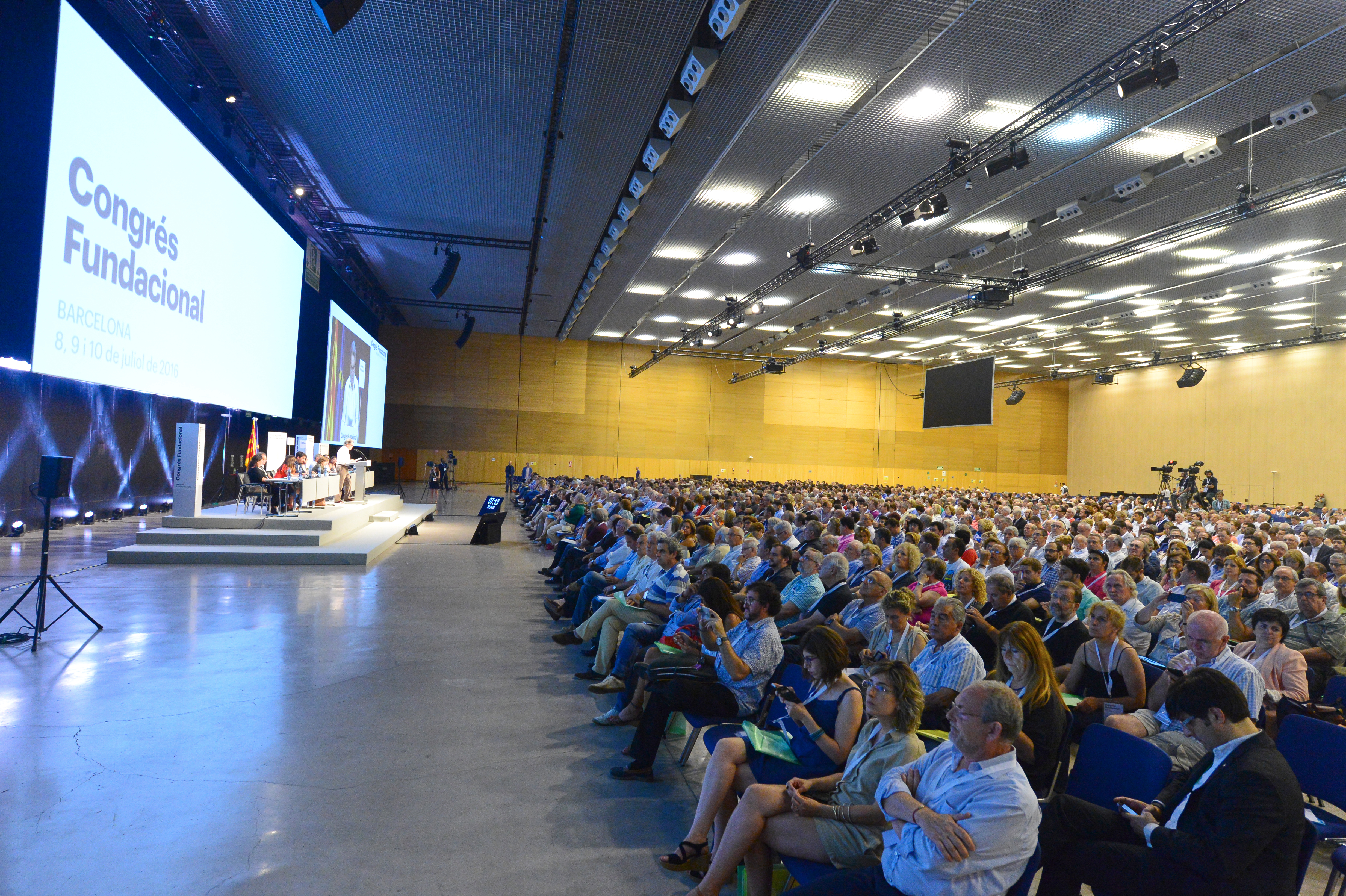 Foto: Julio Diaz